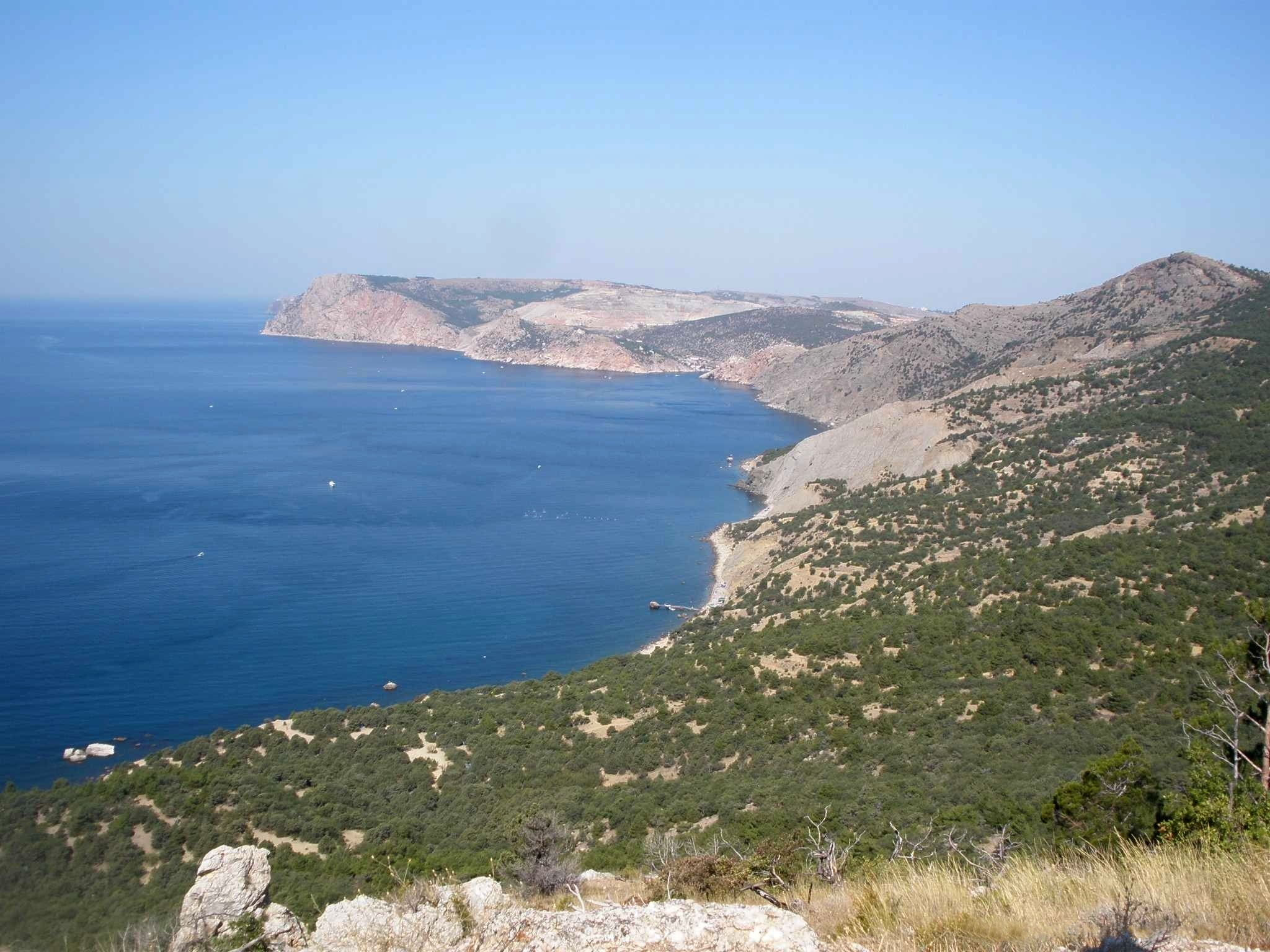 Вход в Балаклавскую бухту. Мыс Айя.